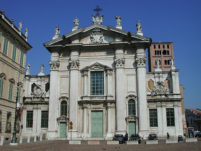 Il Duomo di Mantova Source: photo uploaded by User:RicciSpeziari. Photographer: Riccardo Speziari